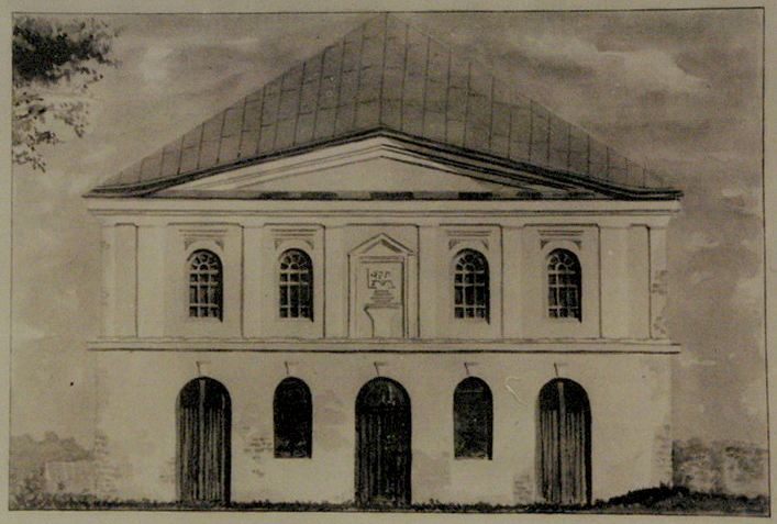 Беларуская (тарашкевіца): Столін (Stolin). Сынагога